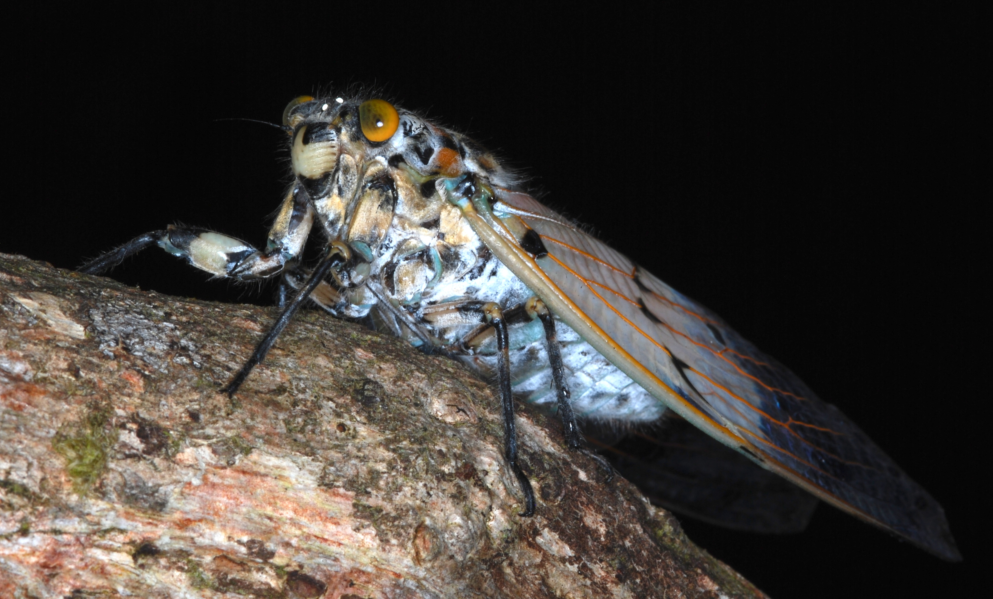 Tapah Hills, Perak, MALAYSIA